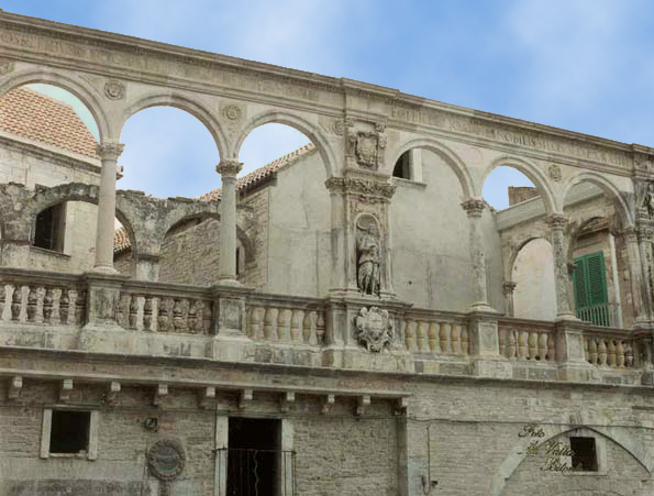 Bitonto, Palazzo Sylos-Calò